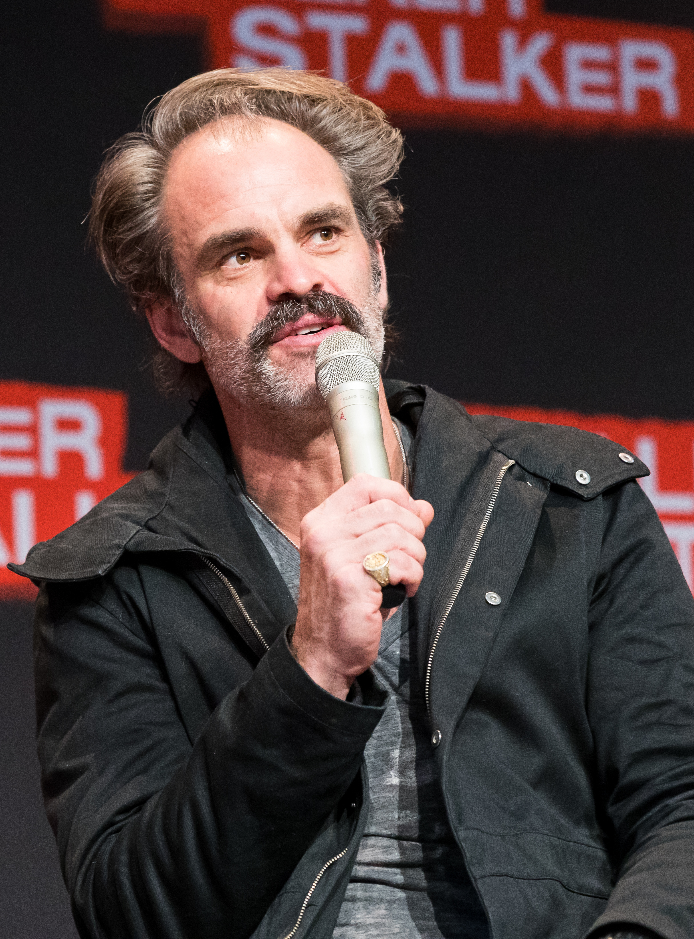 Steven Ogg during Walker Stalker Con at Maimarkthalle, Mannheim, Baden-Württemberg, Germany on 2018-03-17, Photo: Sven Mandel